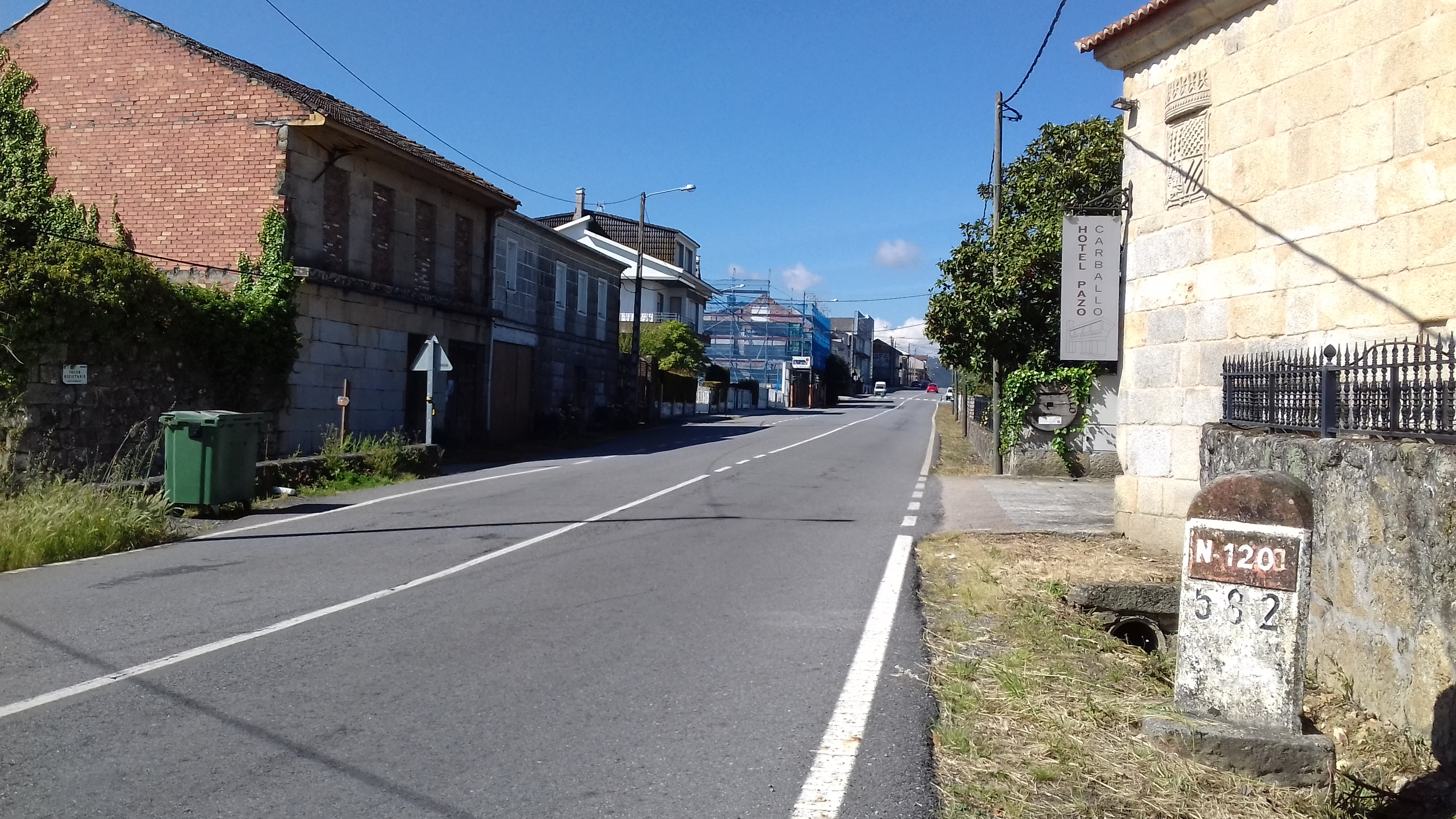 Fito nº 582 da estrada N-120 en San Paio, na parroquia de Ventosela, no concello de Ribadavia, a carón do hotel Pazo Carballo. Actual estrada OU-406